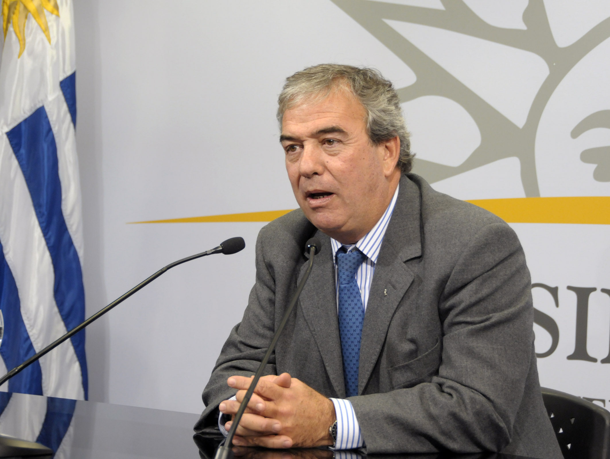 Senador de la República Oriental del Uruguay